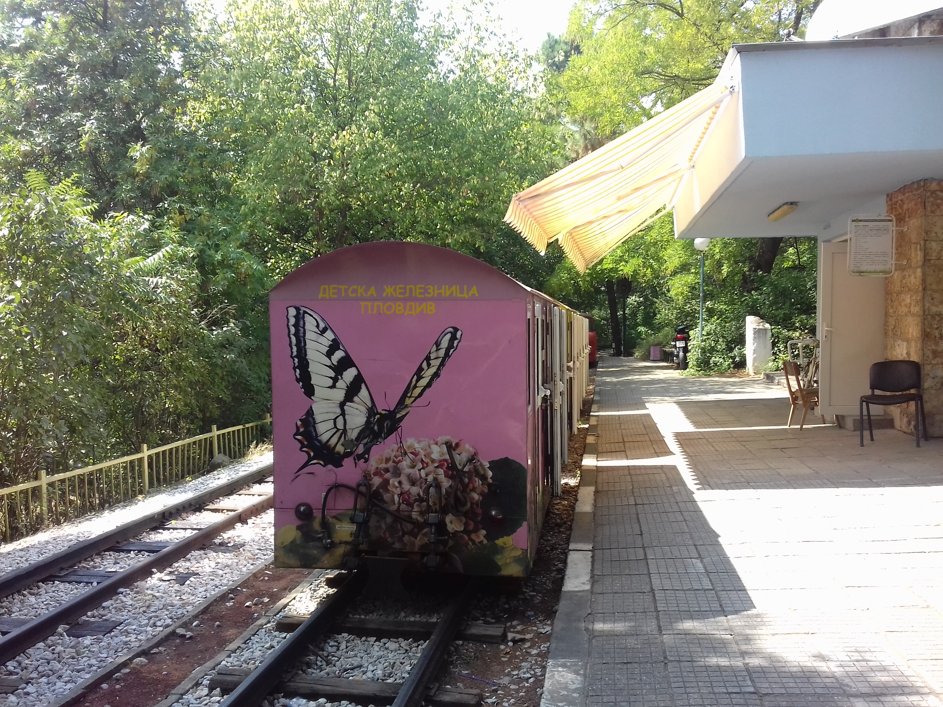 Детската железница в Пловдив.